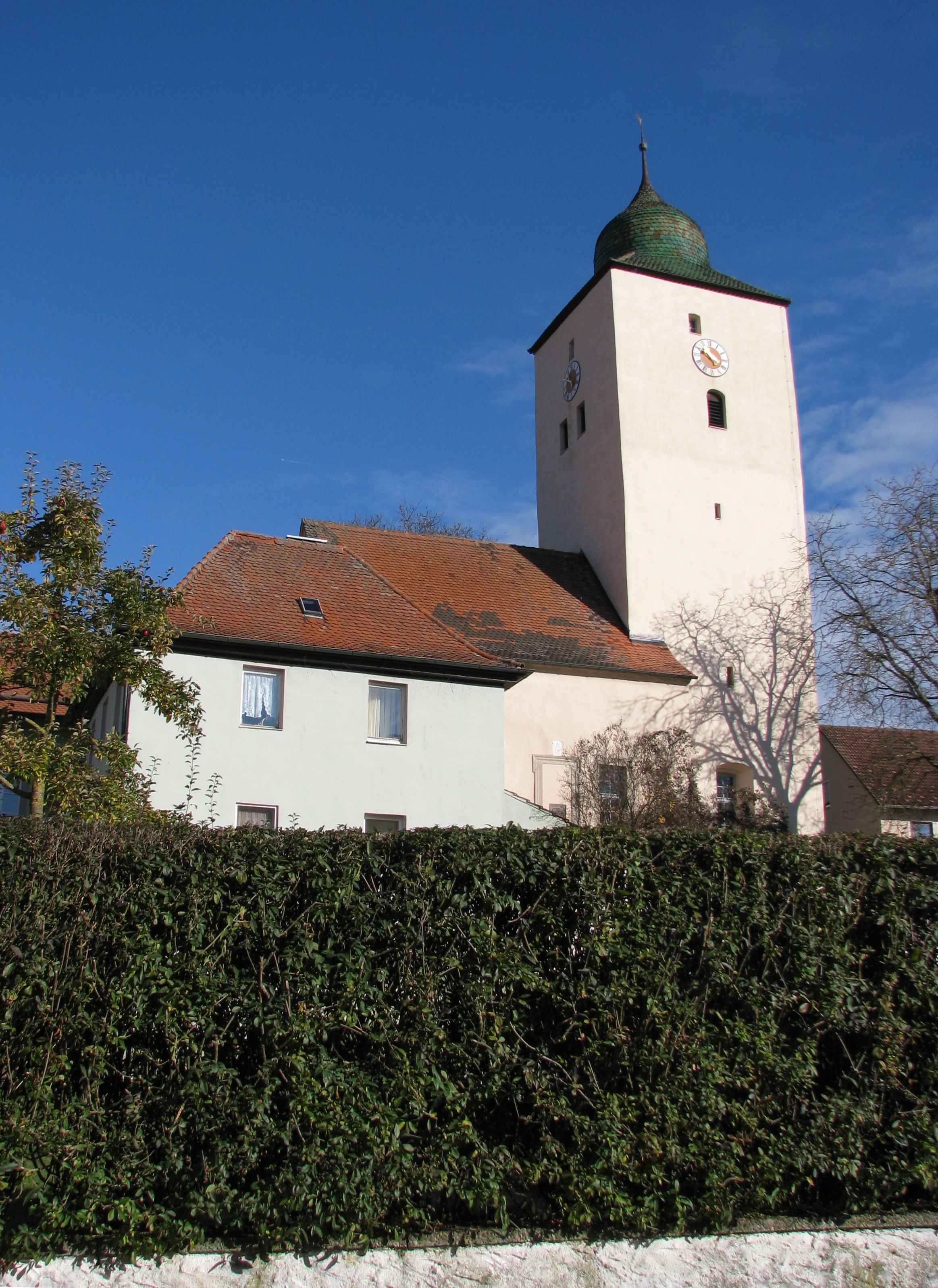 Kirche St. Ulrich in Thalmannsfeld, Ortsteil von Bergen im mittelfränkischen Landkreis Weißenburg-Gunzenhausen